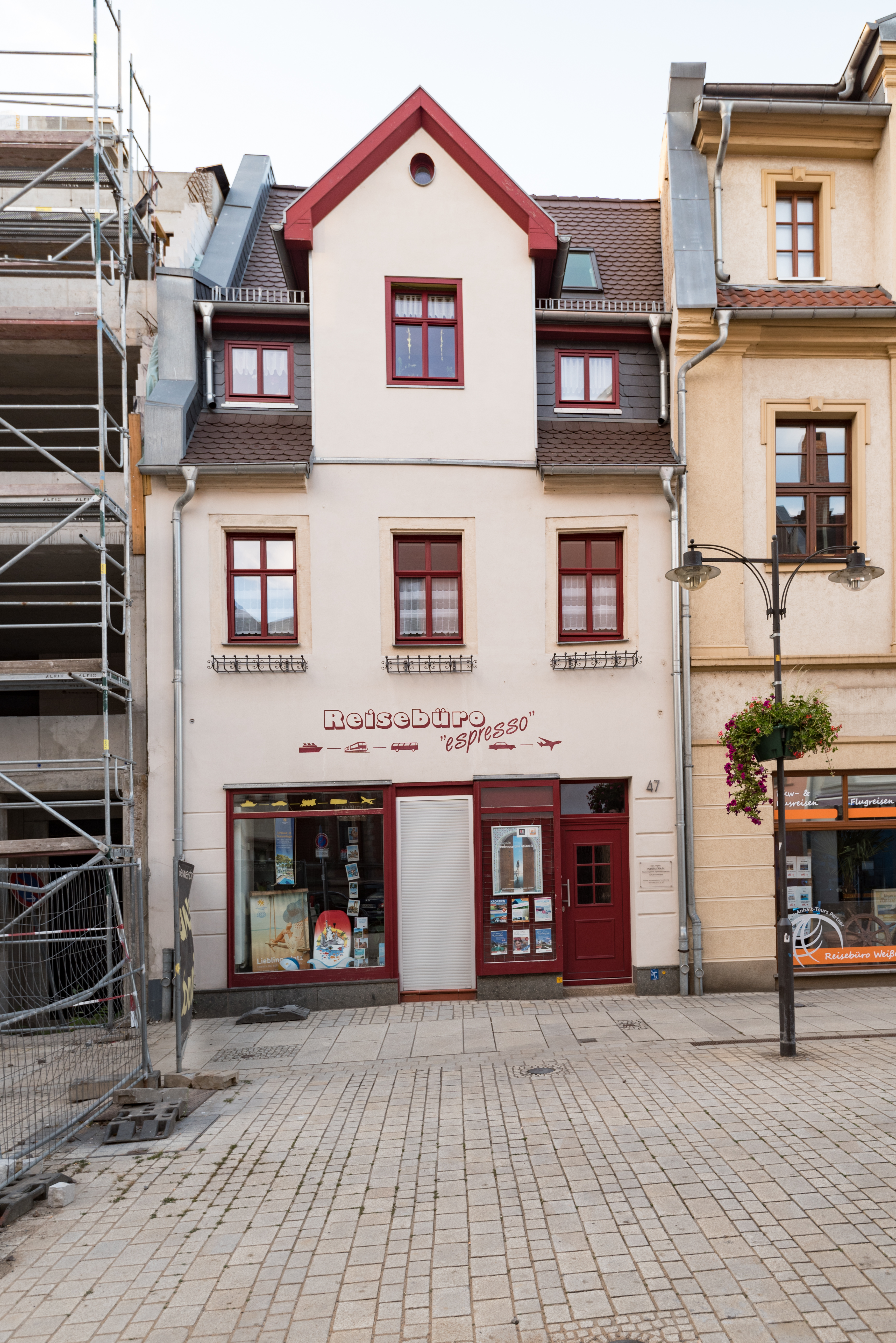 Weißenfels, Jüdenstraße 47